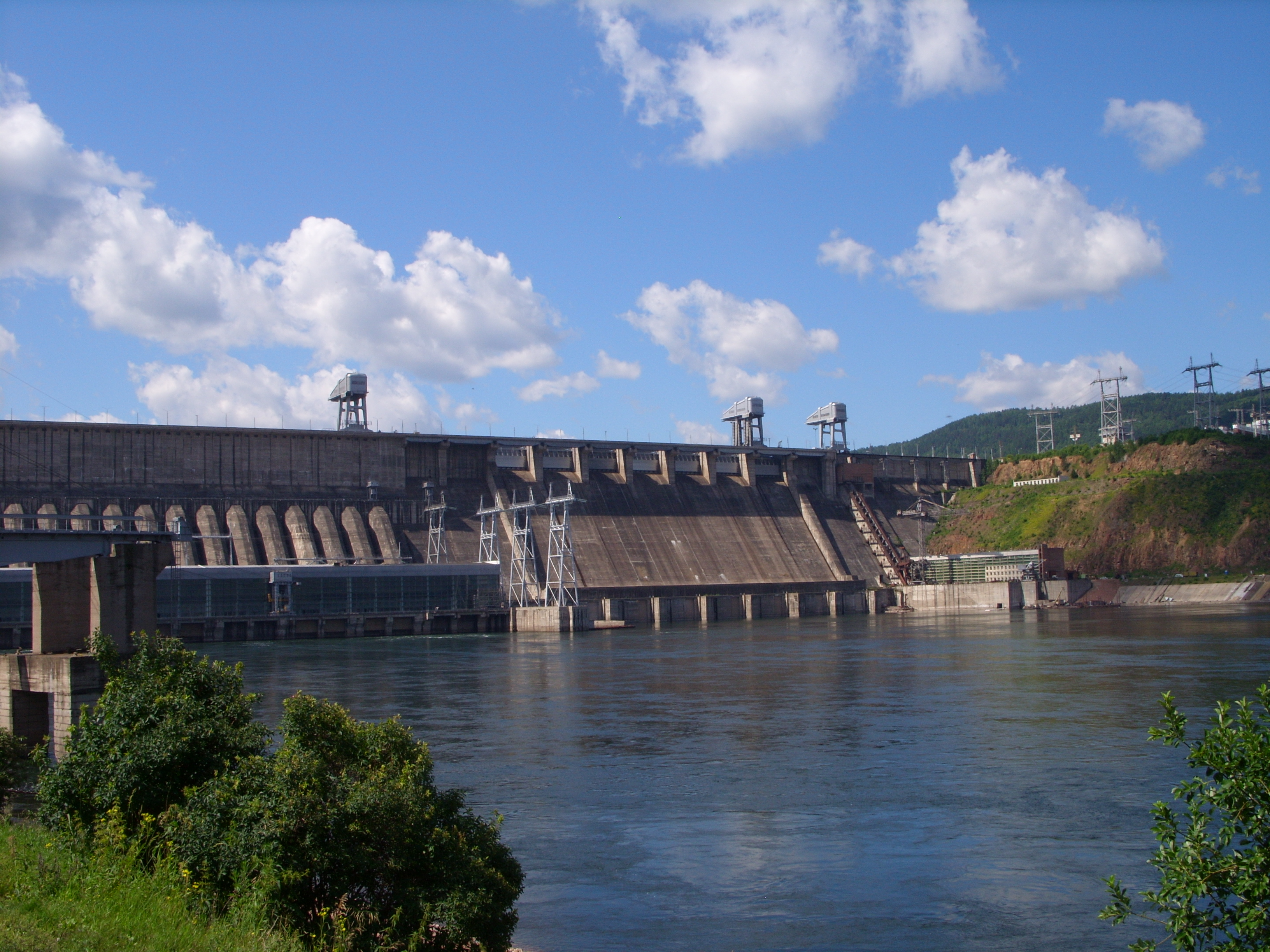 снимки июля 2008 г.